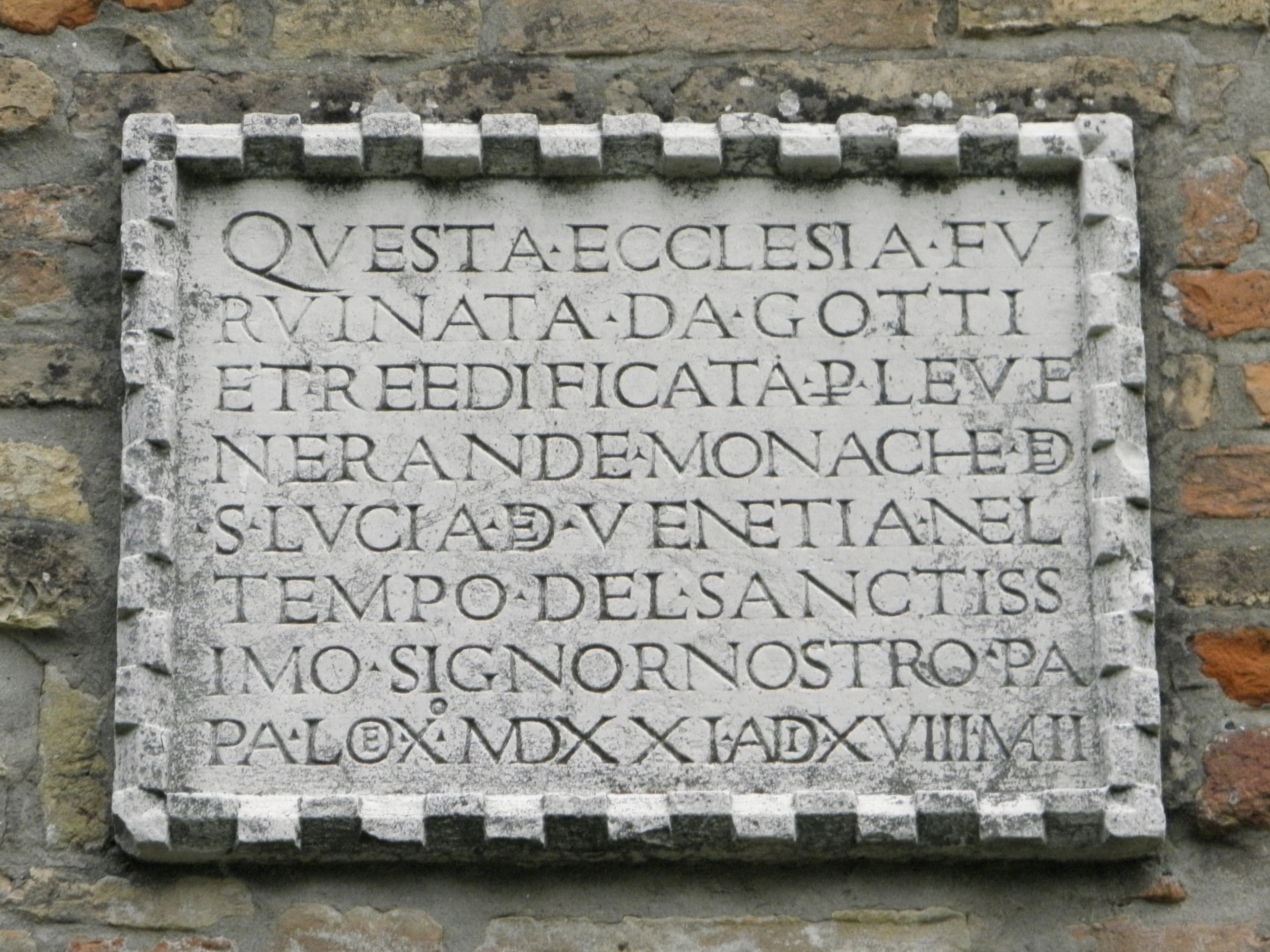 Pisignano, frazione di Cervia: pieve romanica di Santo Stefano: la lapide posizionata sopra il portale della chiesa.